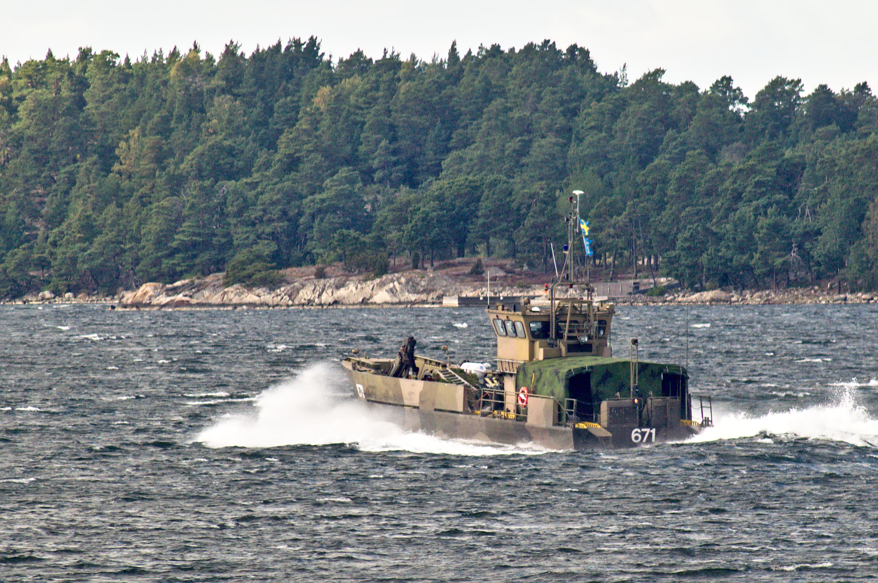 Lätt trossbåt 671 utanför Ornö.